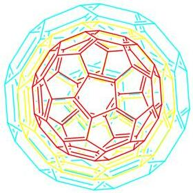 fig 13